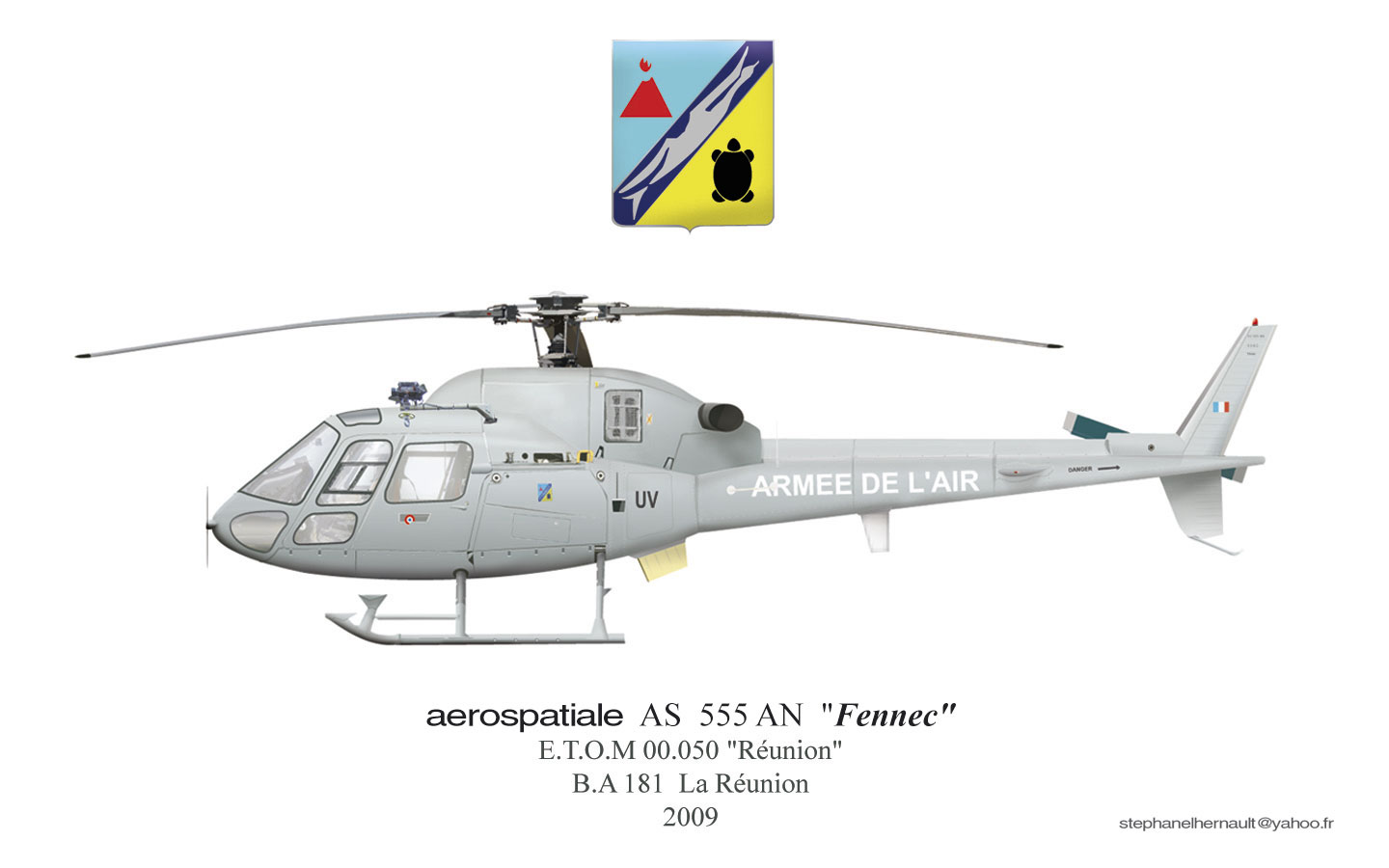 Aérospatiale AS555AN Fennec ETOM 50 Reunion